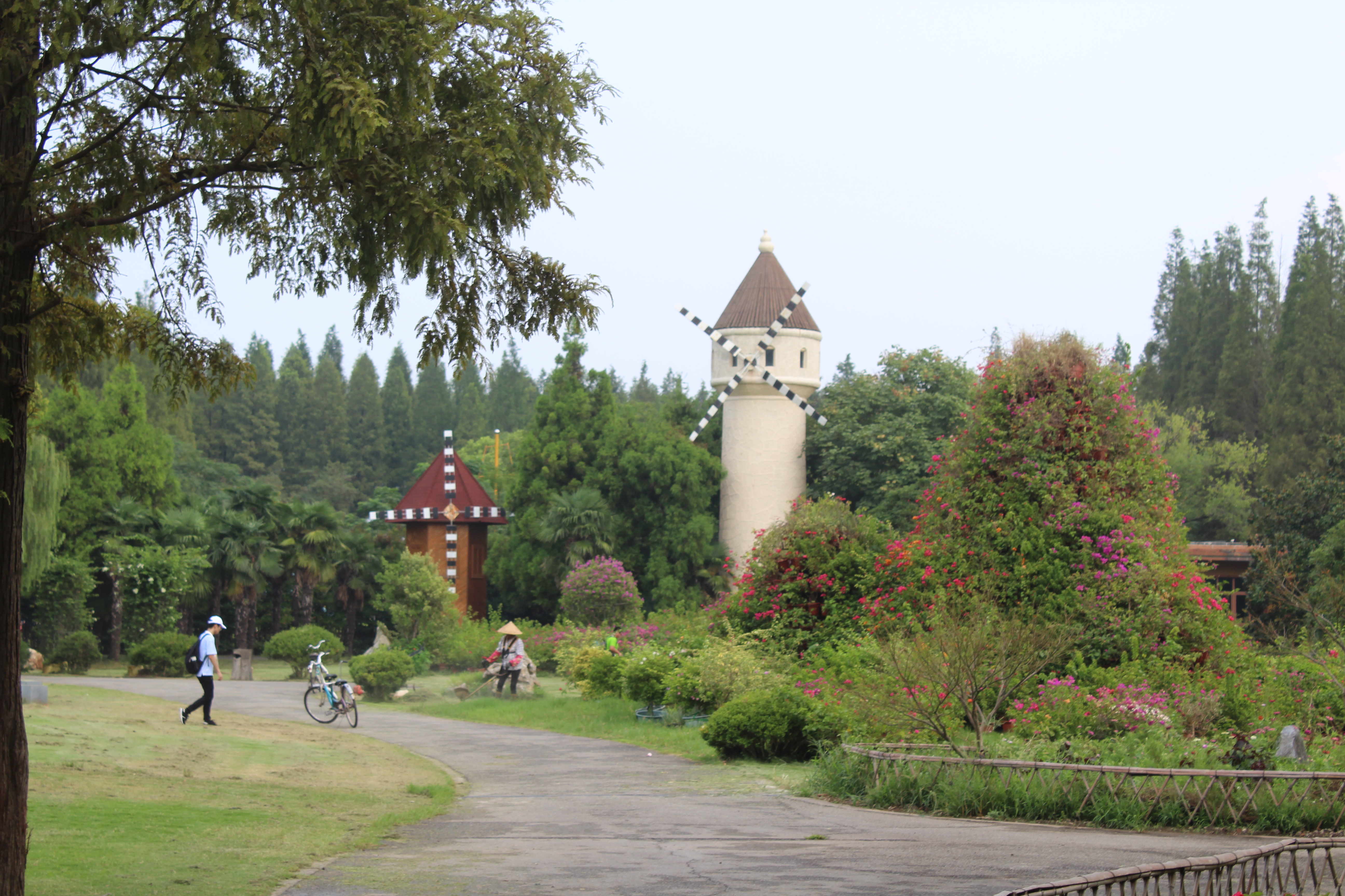 Moulins au niveau du Parc National de Dongping Île de Chongming, Municipalité de Shanghai, Chine